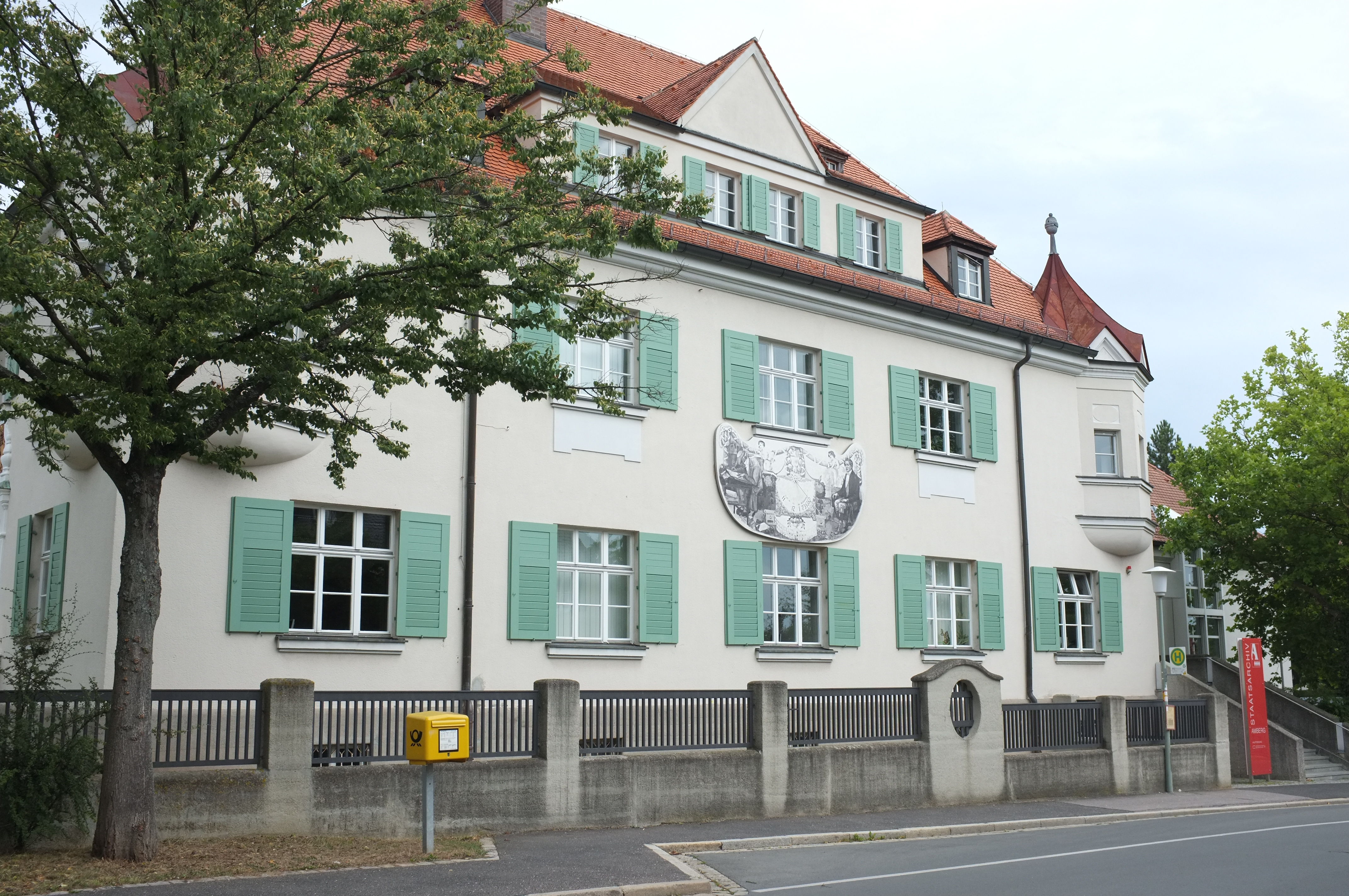 Dienstgebäude des Staatsarchivs Amberg (Deutschland)